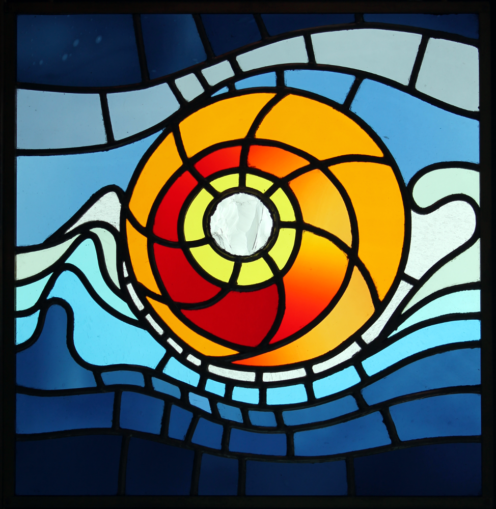 Es handelt sich hier um ein Glaskunstwerk, das von Hans-Georg Losert, einem Glasrestaurator aus Halberstadt, entworfen und kreiert wurde.